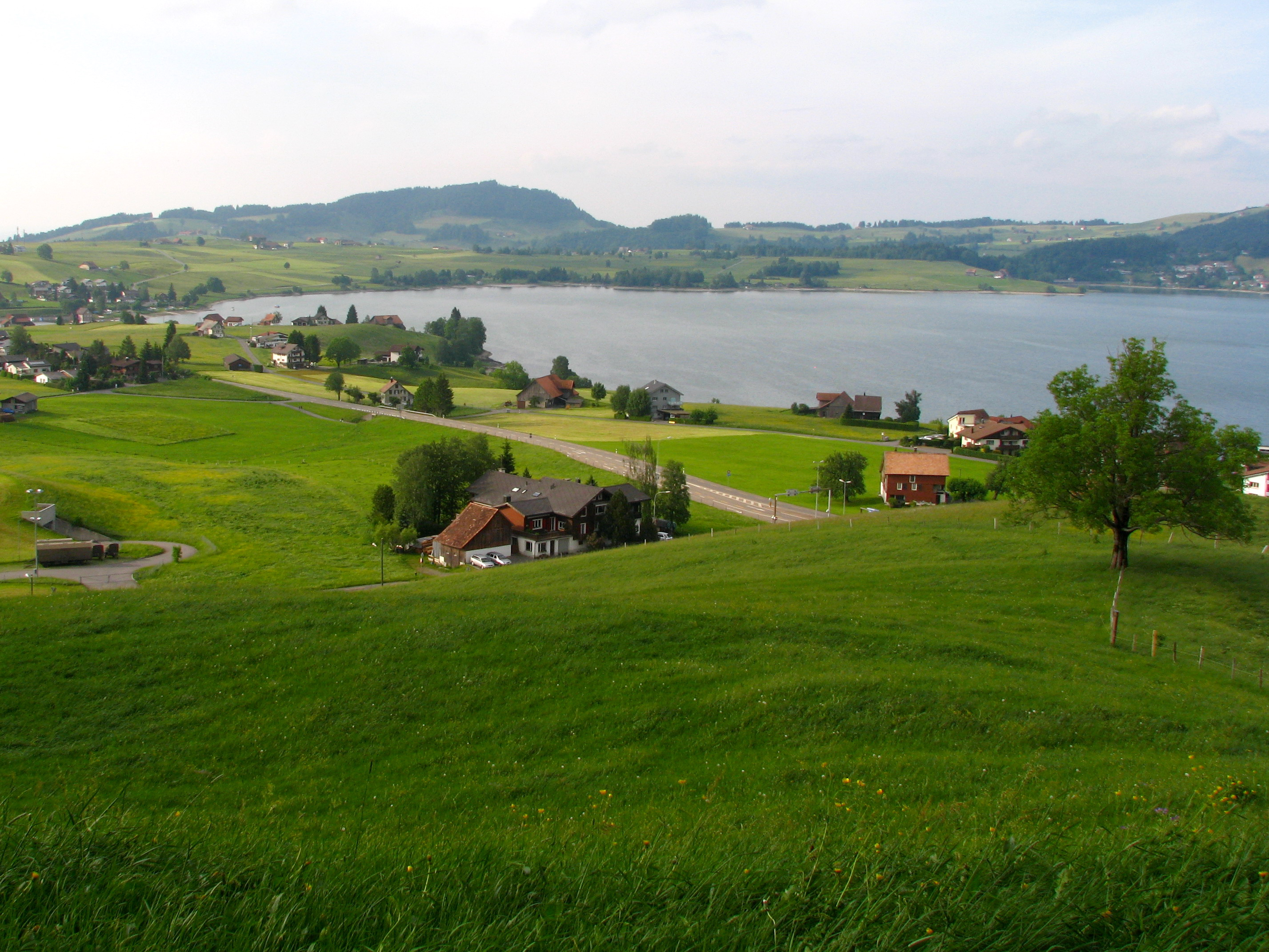 Sihlsee in Einsiedeln (SZ) in Switzerland